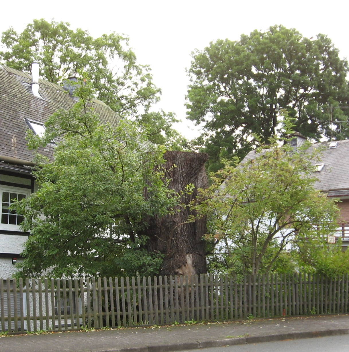 Reststamm der Eiche in Brunskappel („1000jährige Eiche“, Naturdenkmal ND 204).